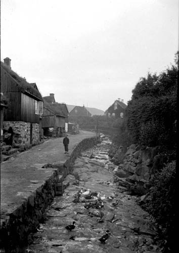 Áarvegur and Havnarár, Tórshavn, Faroe Islands